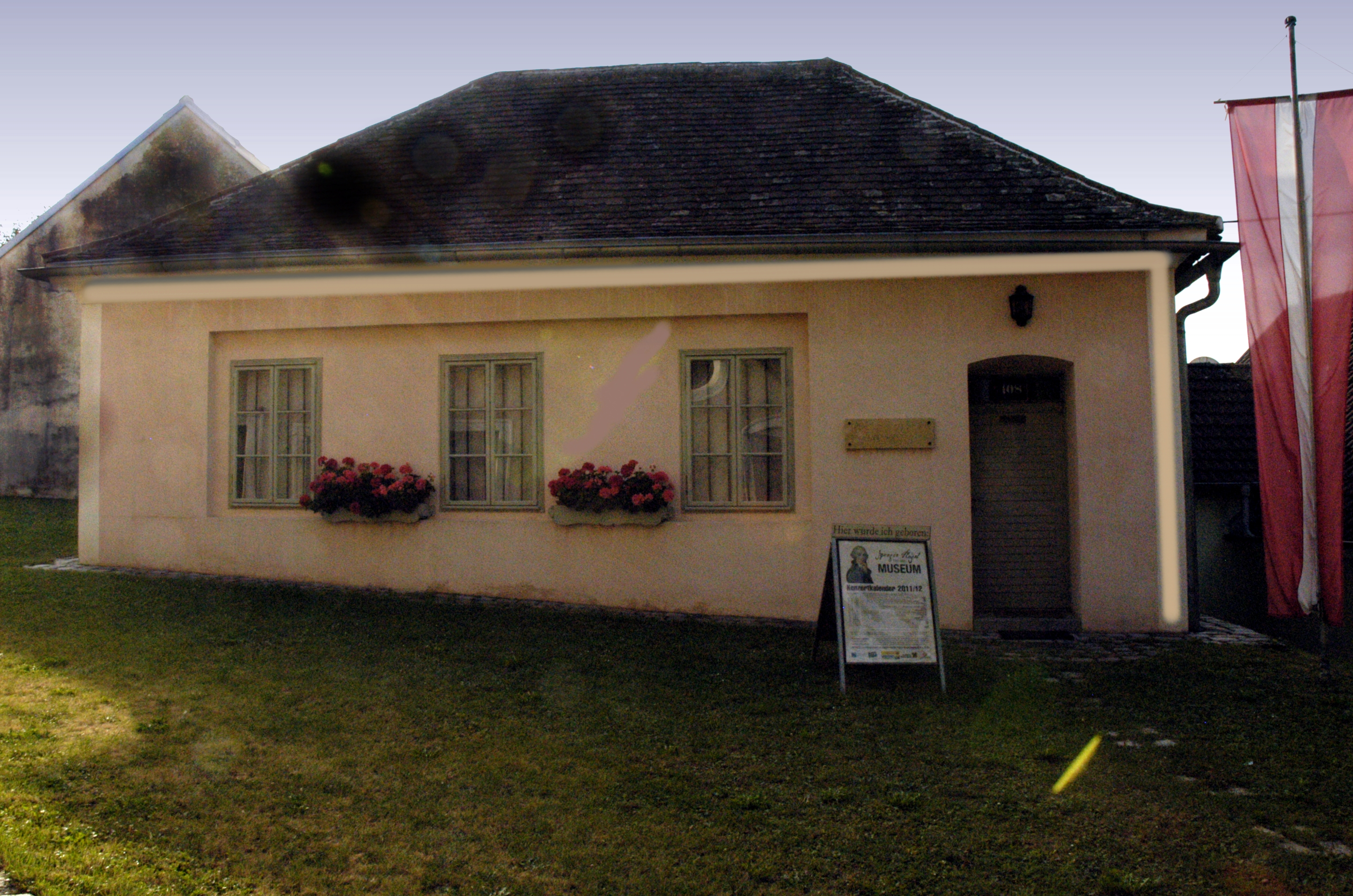 Ehemalige Pleyel Schule in Ruppersthal, Gemeinde Großweikersdorf